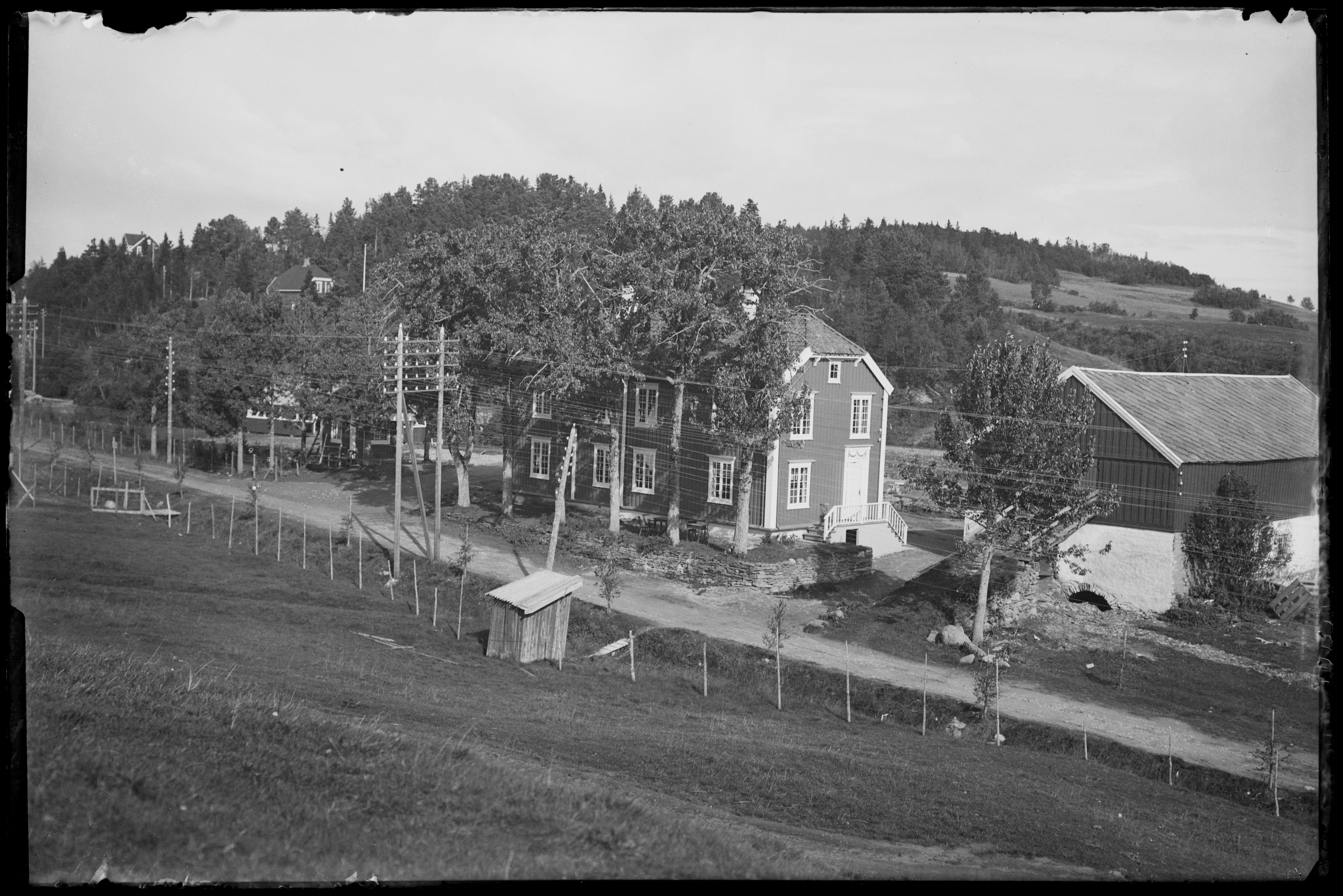 Våningshuset til Ugla gård midt på bildet, låven til høyre. Steinmur. 2 etasjers hus med halvvalmet tak, inngang med trapp på tverrenden. Veien i forgrunnen ble senere utbygd til det som ble Gamle Oslovei. Bak gården gikk bekken fra Kyvannet. Denne var demmet opp slik at det ble flere små dammer.